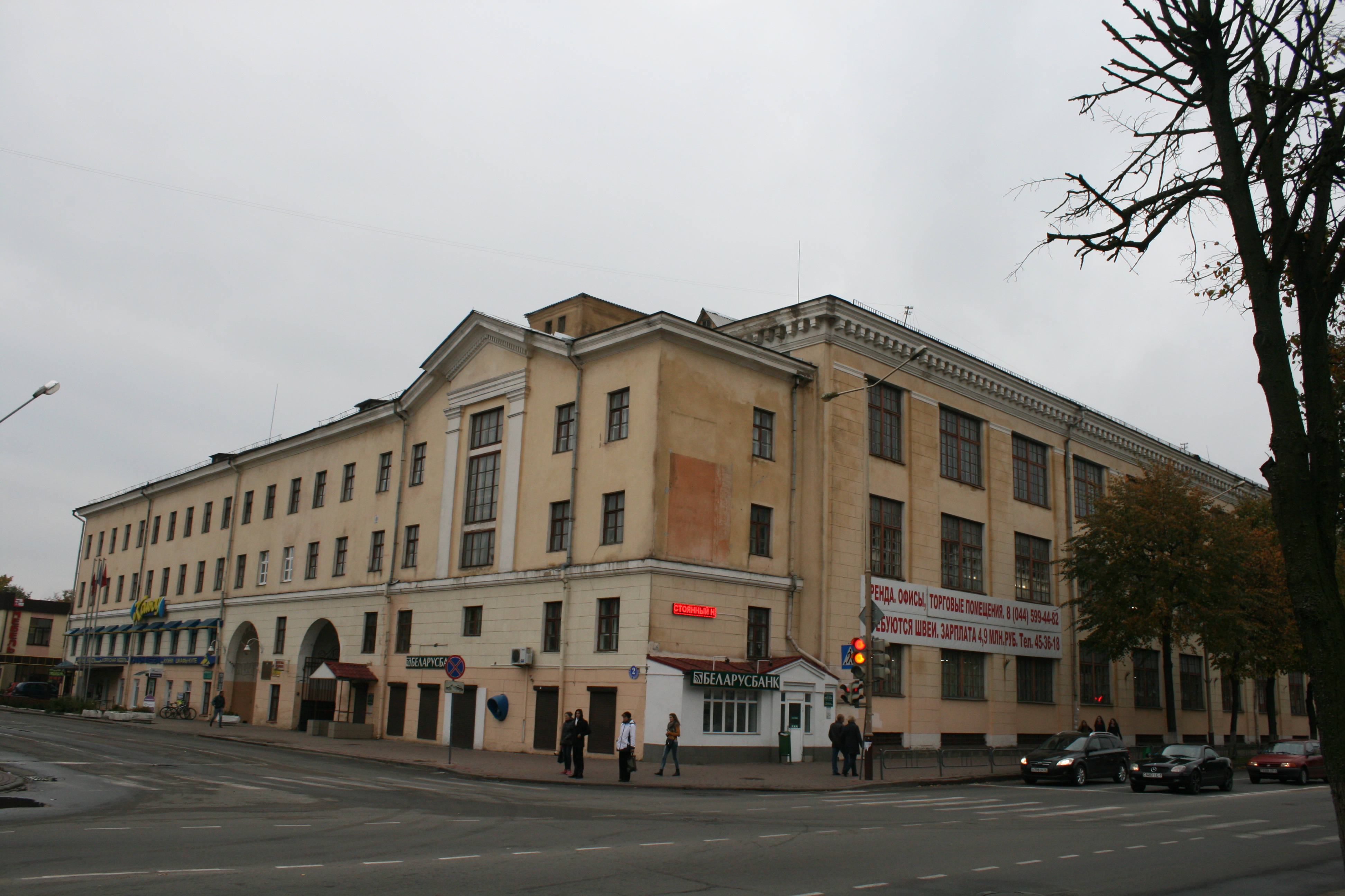 Беларуская (тарашкевіца): Баранавіцкая Швейная Фабрыка 08.10.2016 - вуглавы від з вуліцы Леніна.